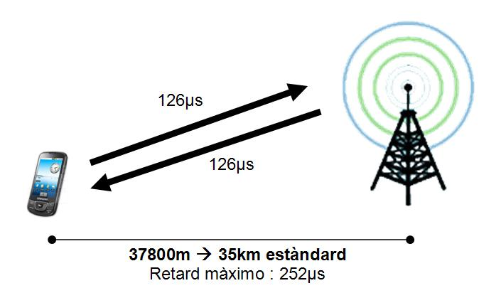 Relació distància màxima-retard de propagació.